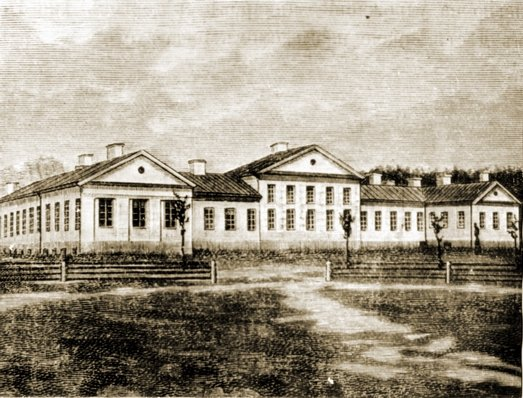 Беларуская (тарашкевіца): Паставы (Pastavy), палац Тызэнгаўзаў (Tyzenhaus)